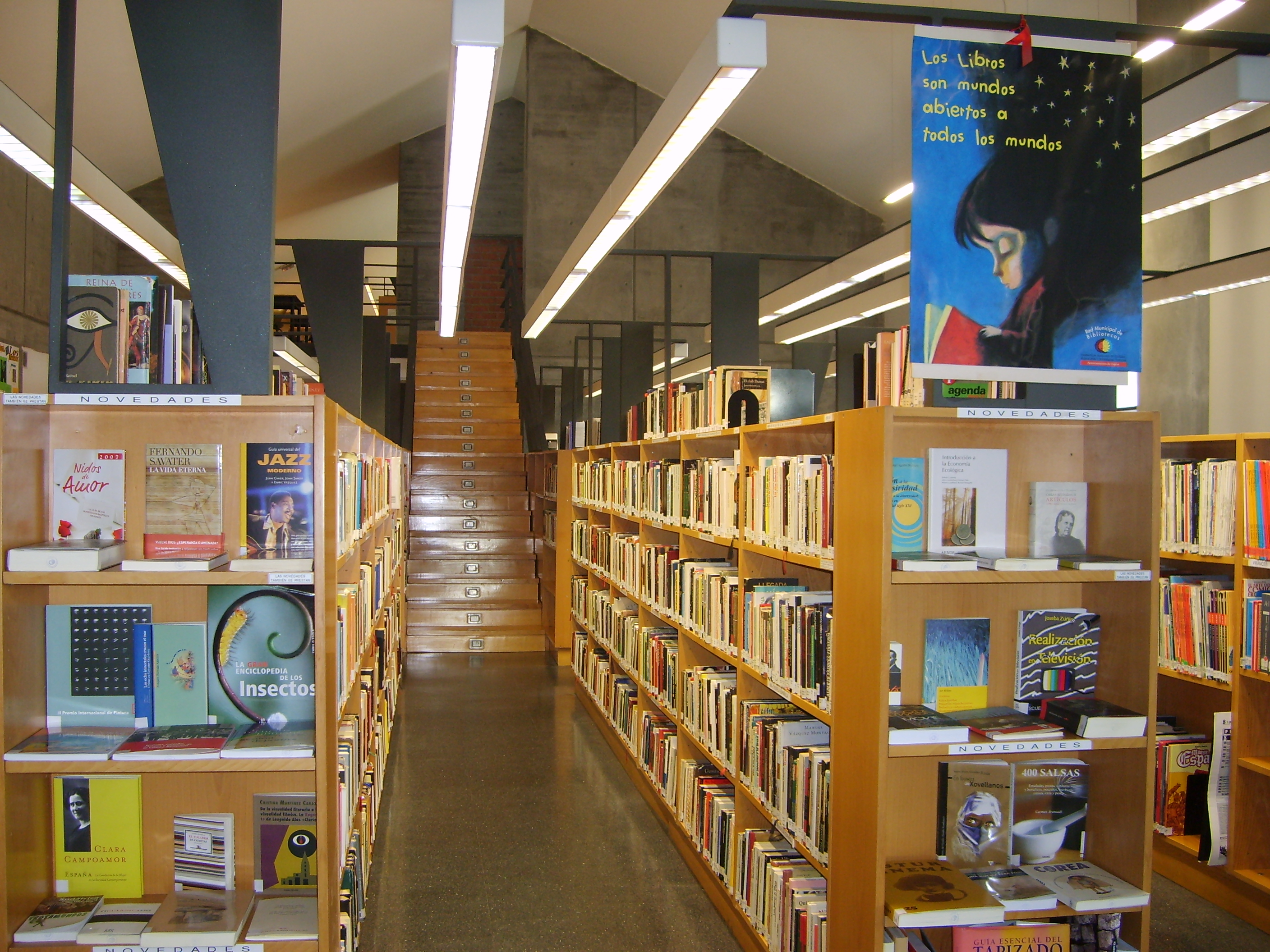 Fotografía de la Biblioteca de El Coto